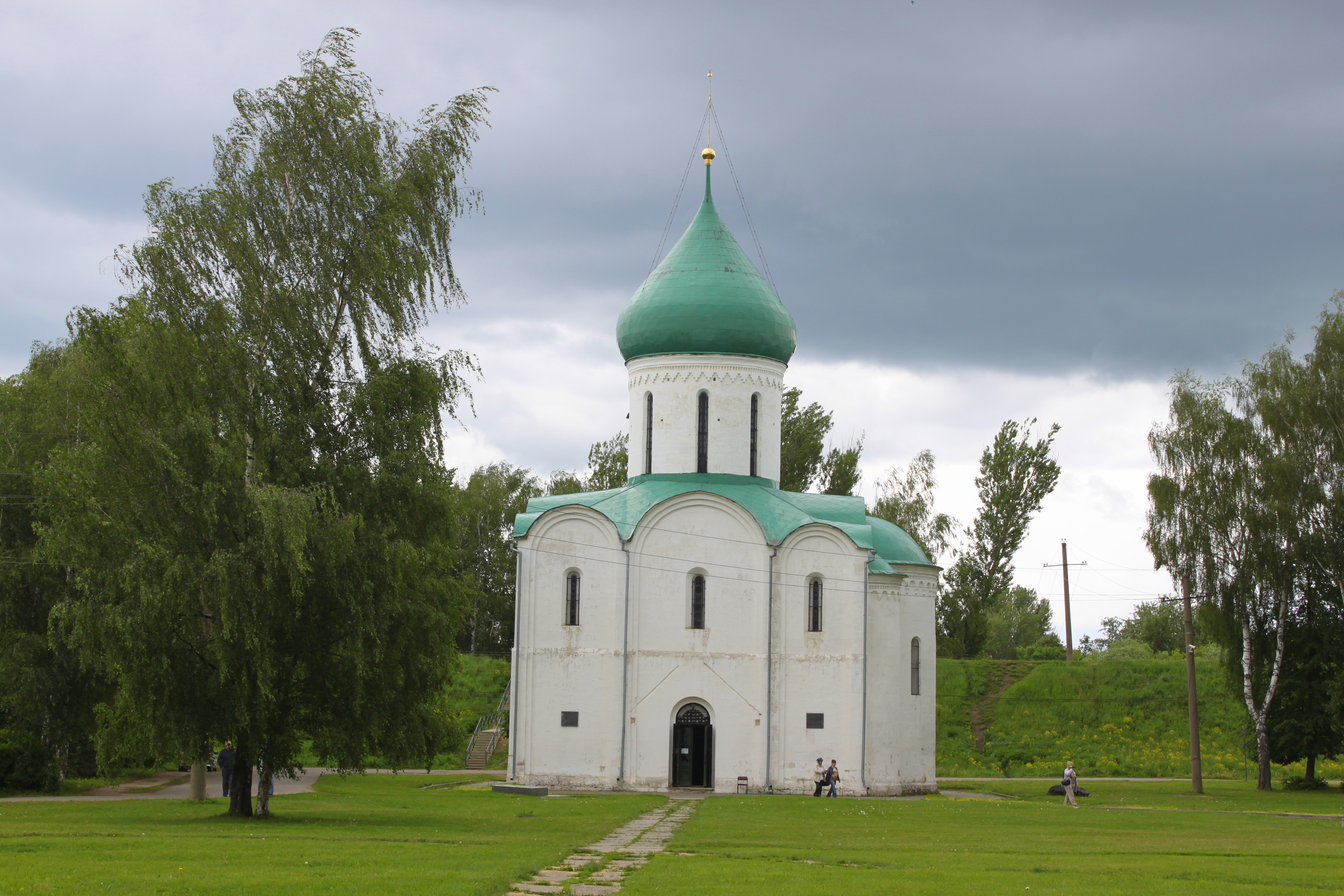 Спасо-Преображенский собор